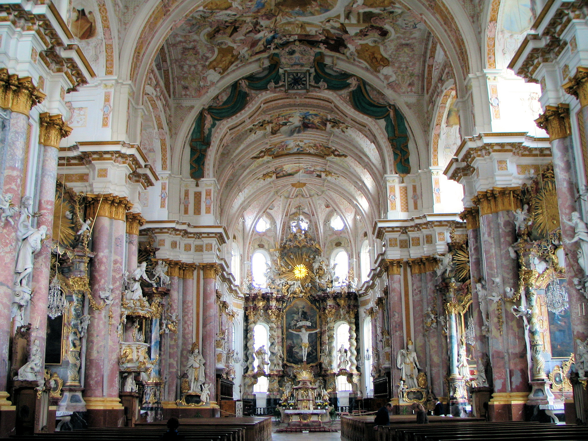 Kloster/monastry Fuerstenfeldbruck